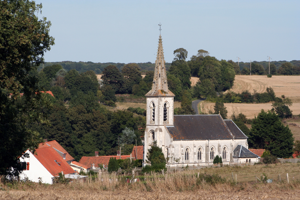 Airon-Saint-Vaast église